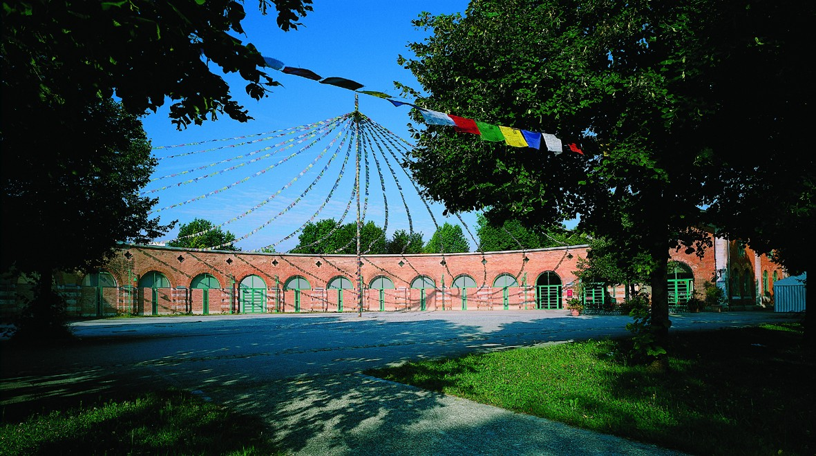 L:\Abteilung Marketing\Marketing\Praktikanten\Julia Schäfer Heute, 23. Juli 2009, 12:25:36 310 KB (317.549 Bytes)